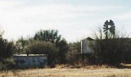 Millville, Arizona